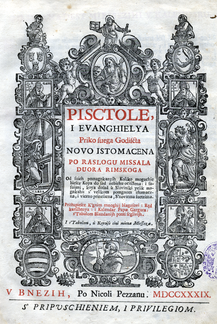 Naslovnica pistola i evandjelja, autora Ivana Bandulavica